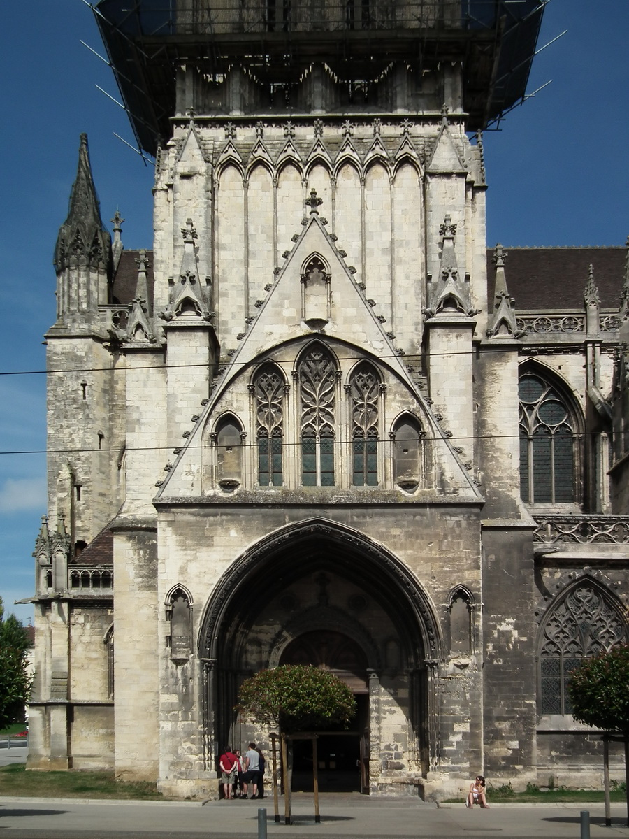 Église Saint-Pierre, Caen, France